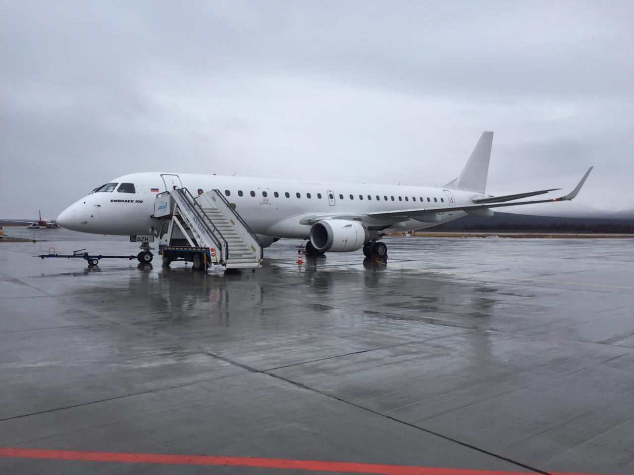 E190 авиакомпании Pegas Fly в Аэропорту Магадан